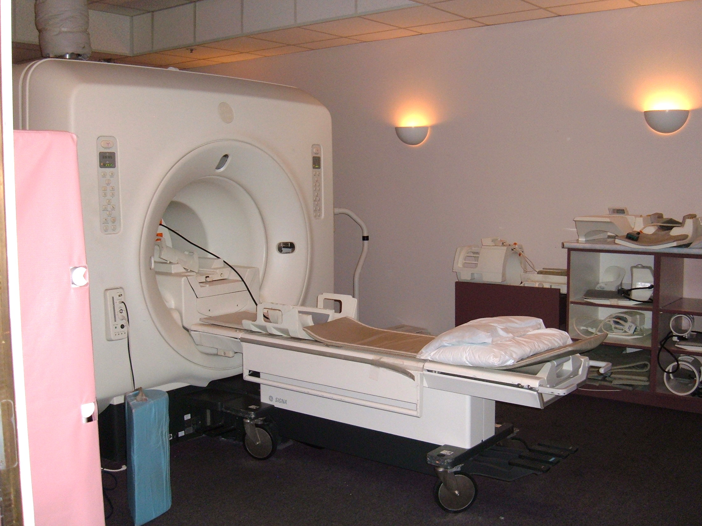 GE Signa MRI machine